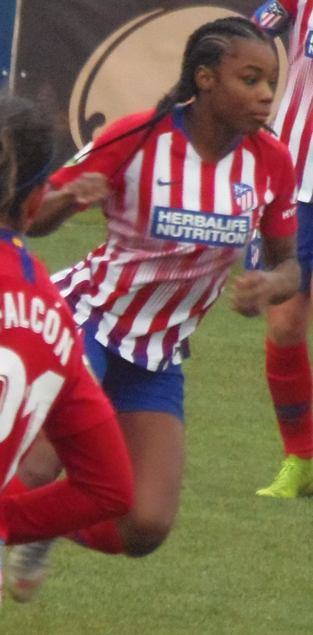 Ludmila da Silva el 22 de diciembre de 2018 jugando con el Atlético de Madrid ante el Sporting de Huelva